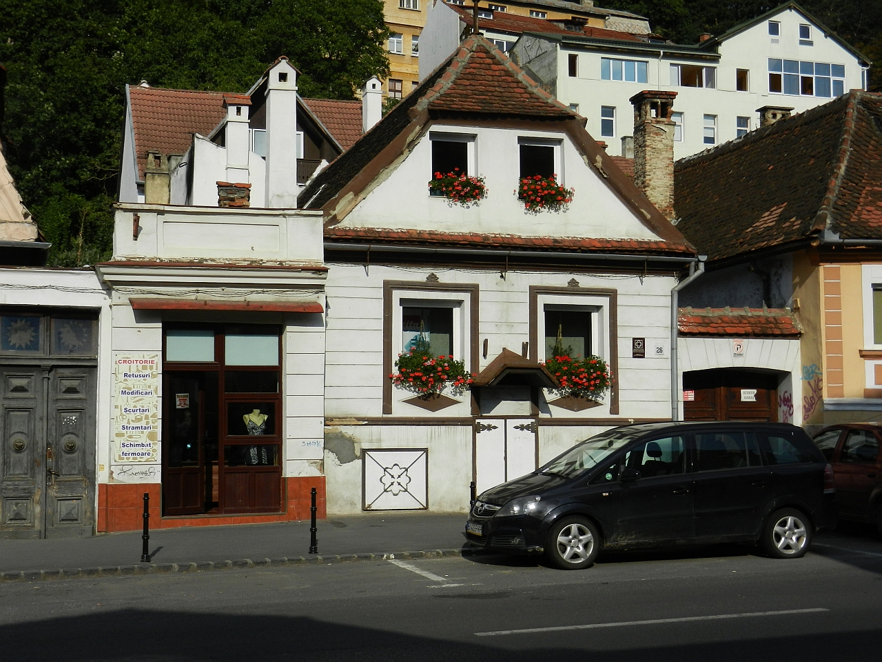 Casa monument istoric (Lunga 26)